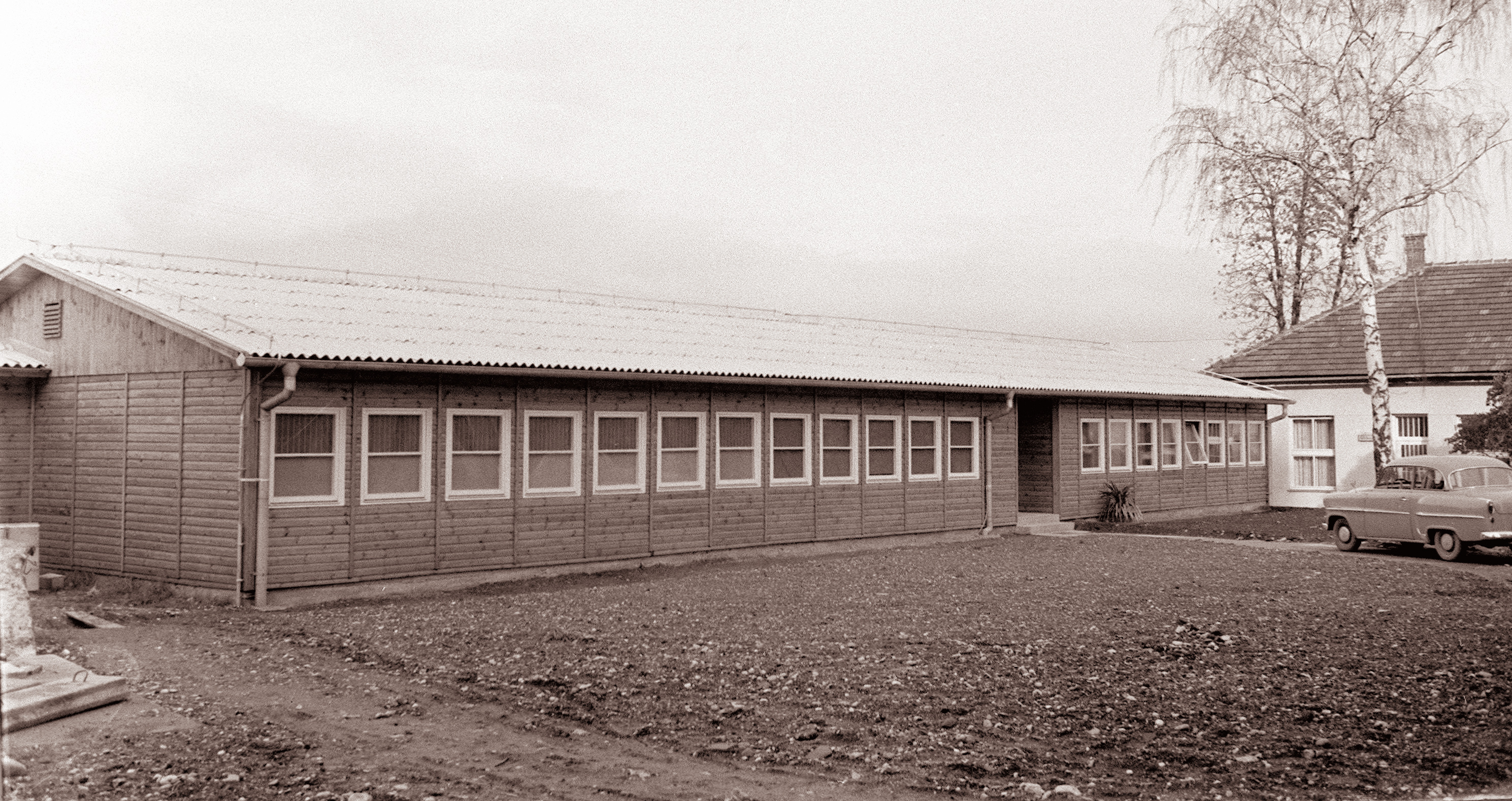 Prostori predkliničnega laboratorija višje stomatološke šole v Mariboru